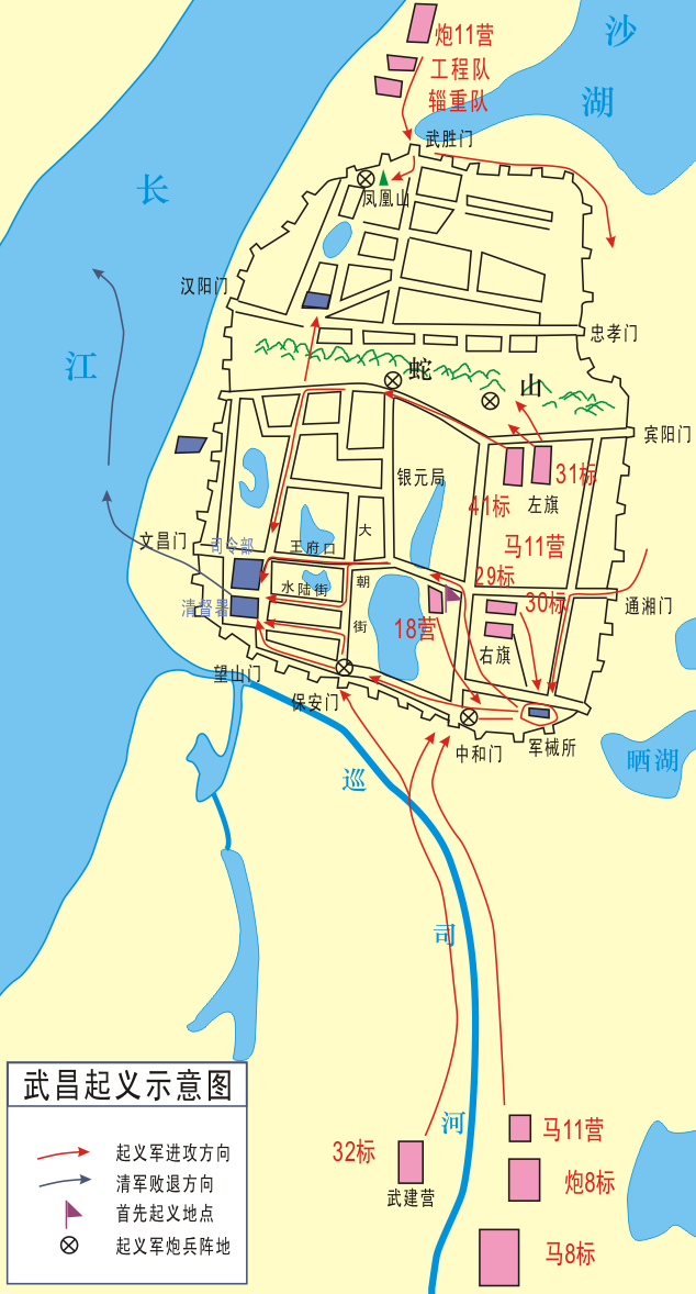 武昌起义示意图 绘制人:竹围墙 画像:武昌起事.png